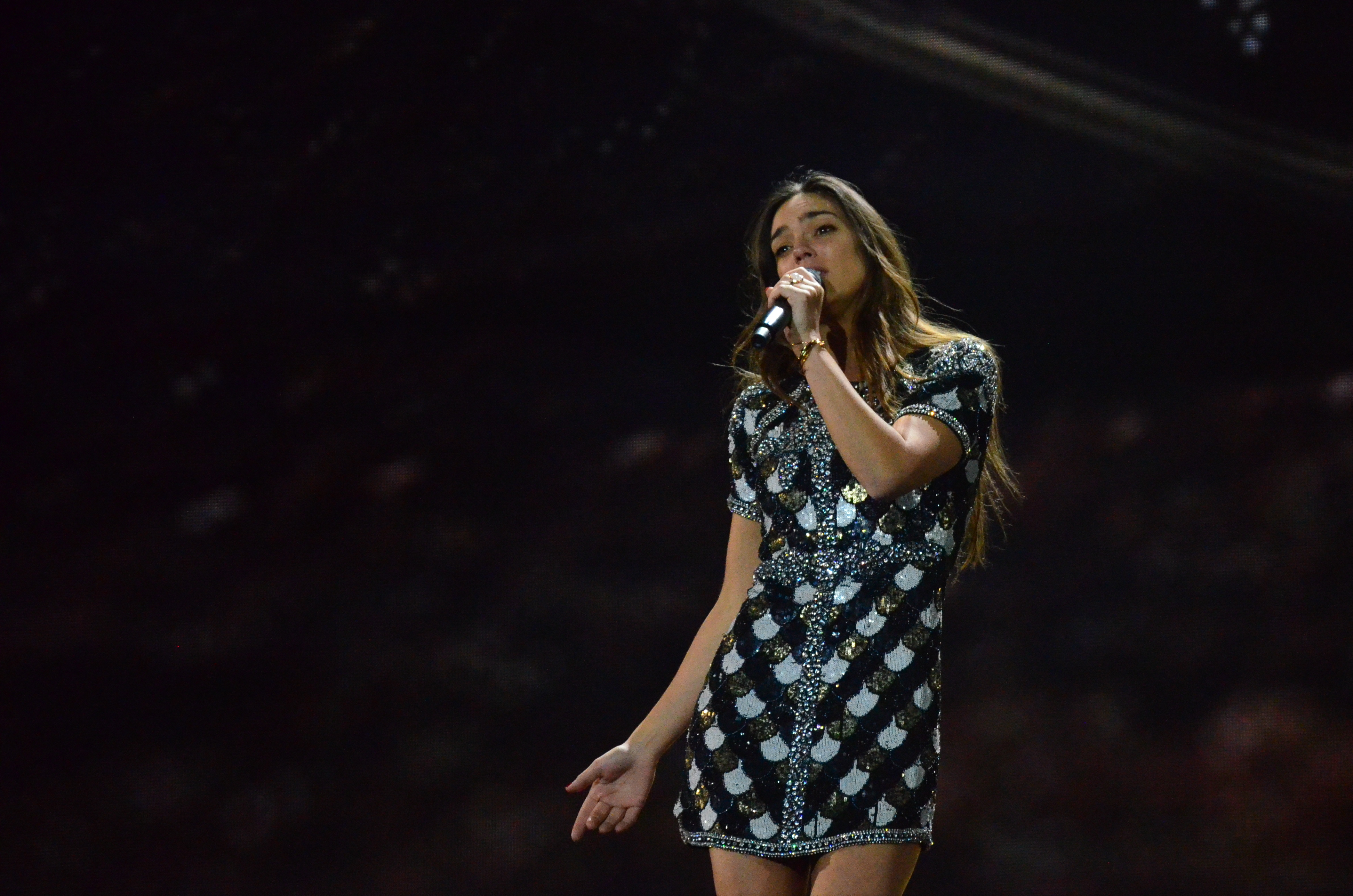 12 травня. Генеральна репетиція фіналу Євробачення 2017. Alma (France).